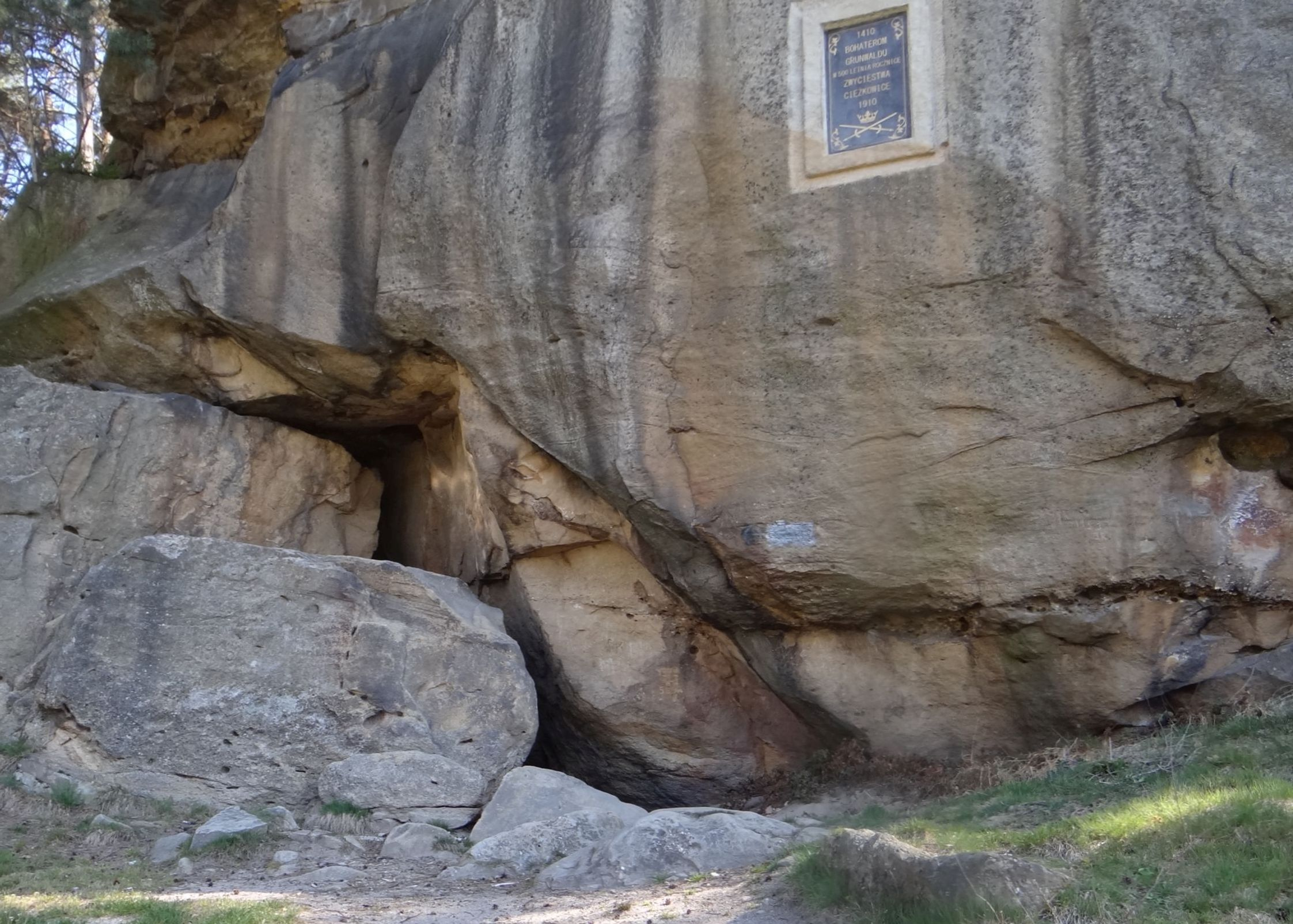 Jaskinia w Grunwaldzkiej Skale